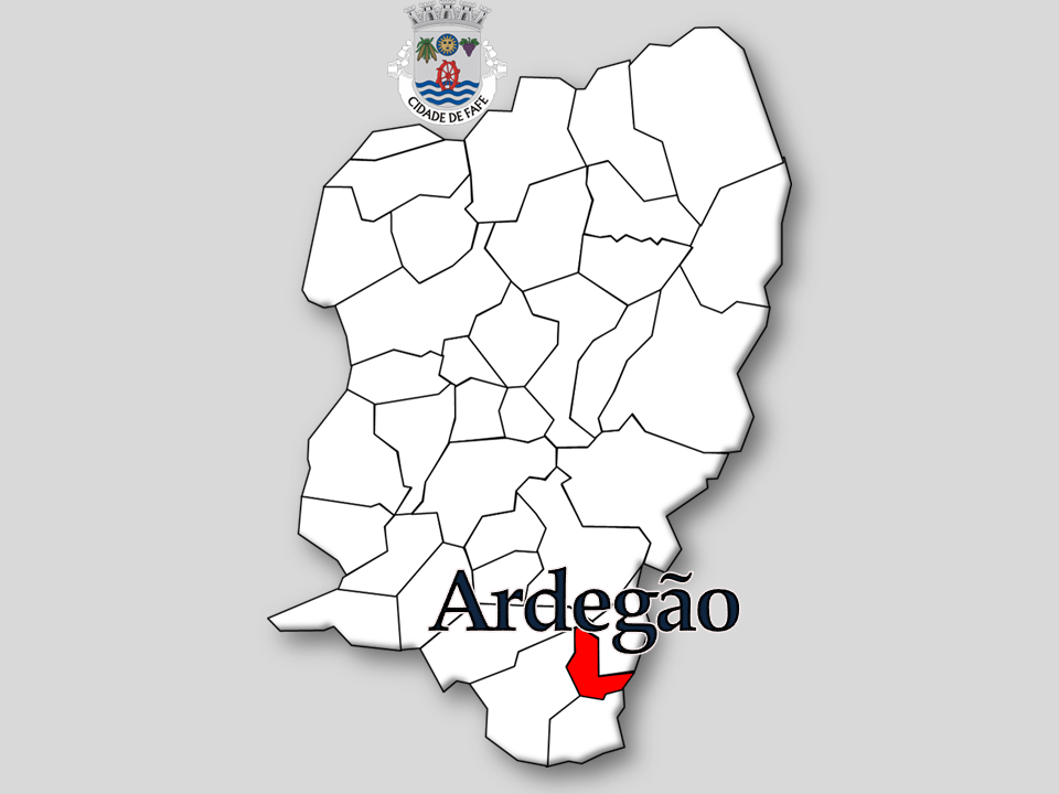 Censos 1864/2011